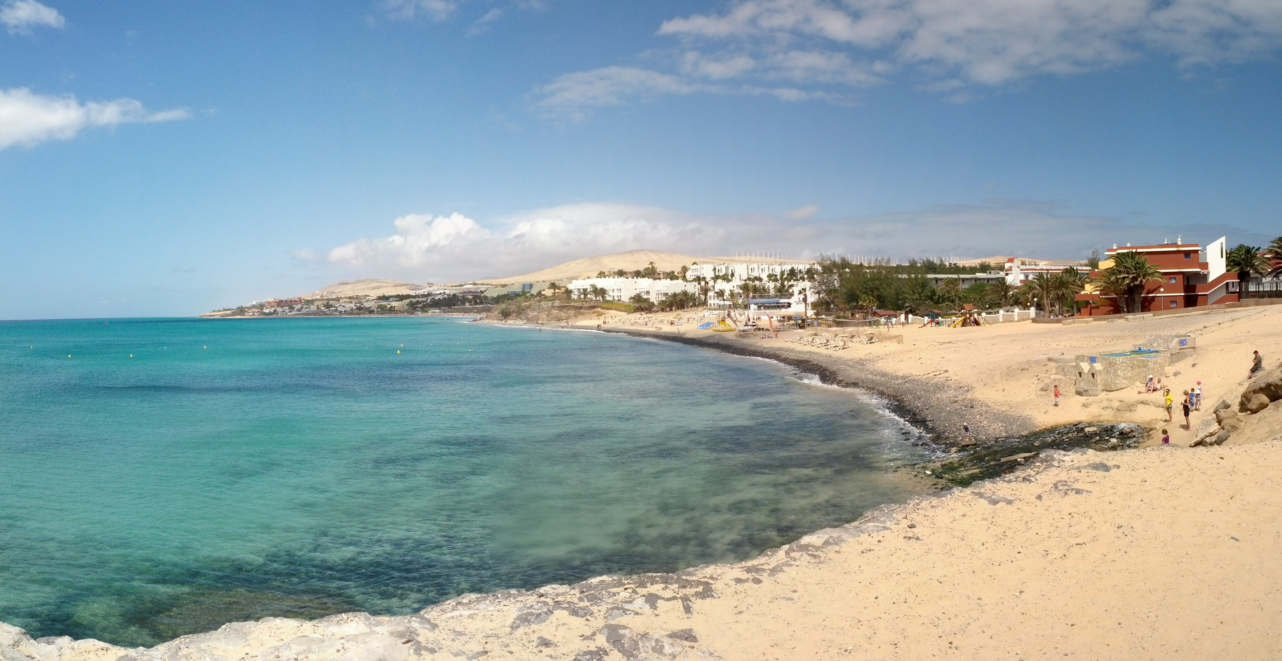 Playa de Costa Calma, Costa Calma, Fuerteventura